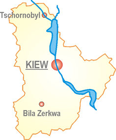 Oblast Kiew mit Tschornobyl.